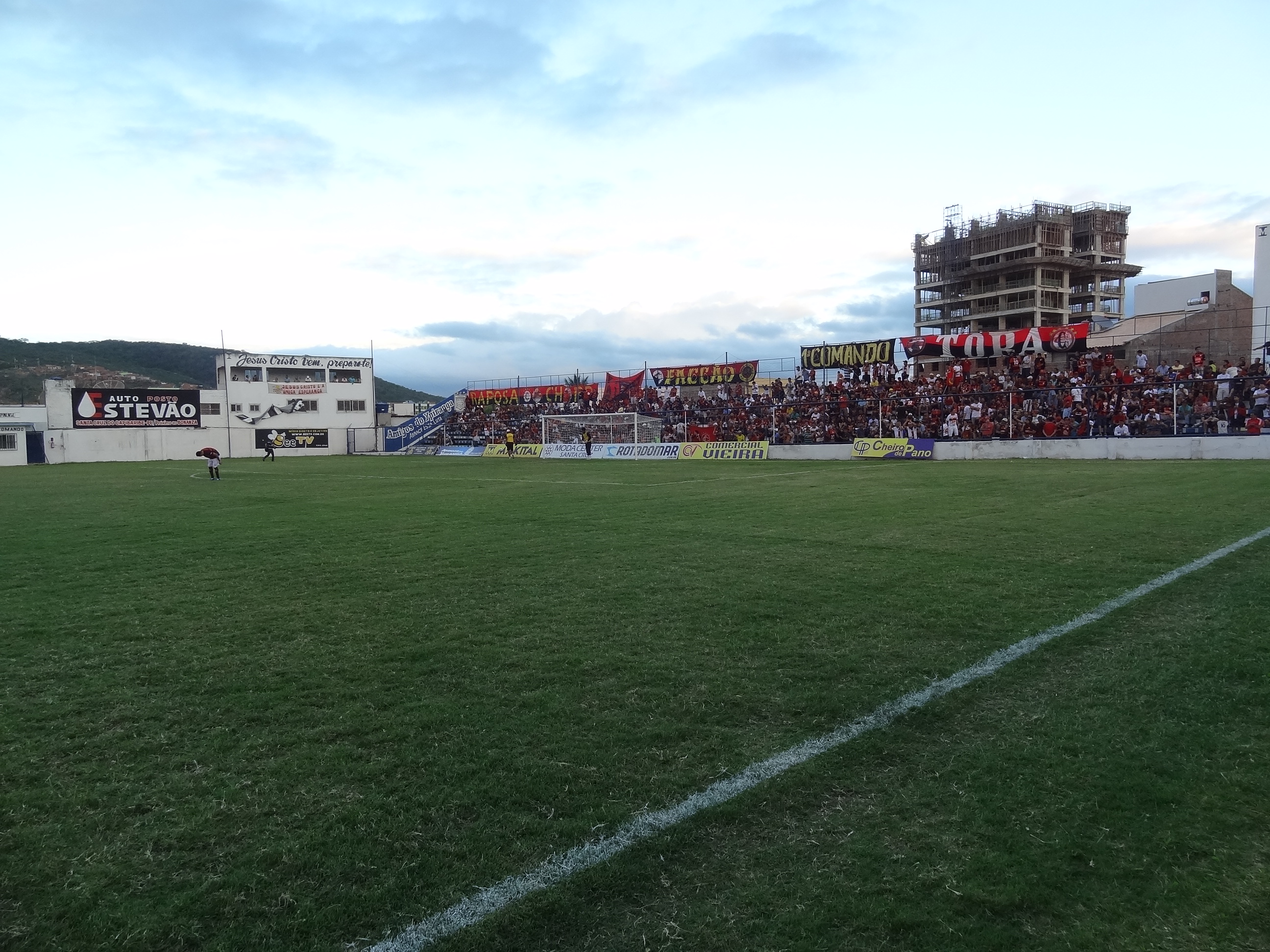 Torcida do Campinense no estádio Limeirão, em jogo da Série D 2012.